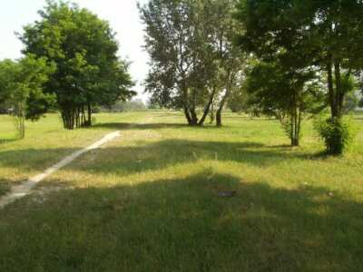 Moja fotka uzemia, kde stoji Kaufland este z cias, kedy tu nestaval...